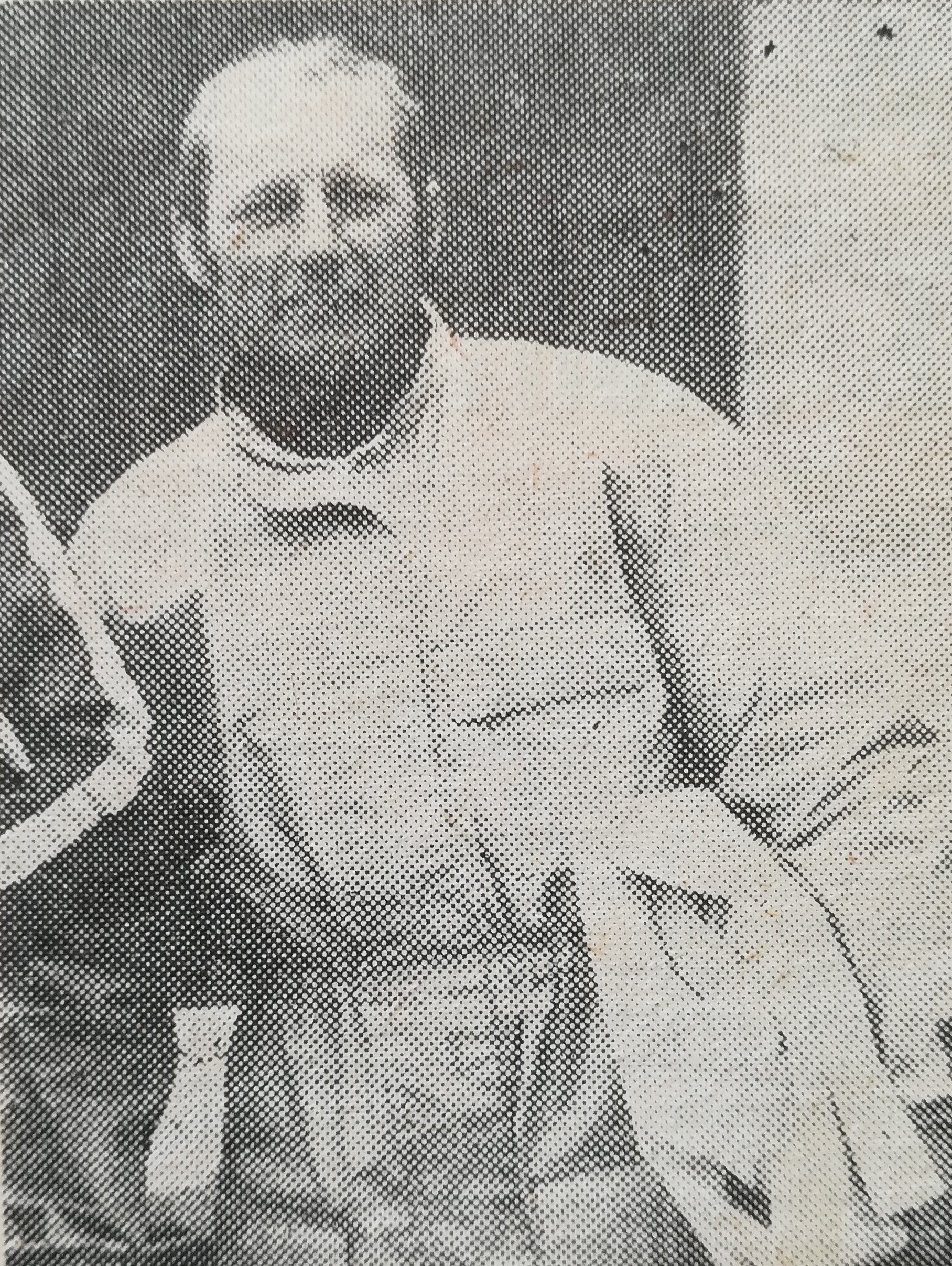 Zbigniew Kania - polski żeglarz.